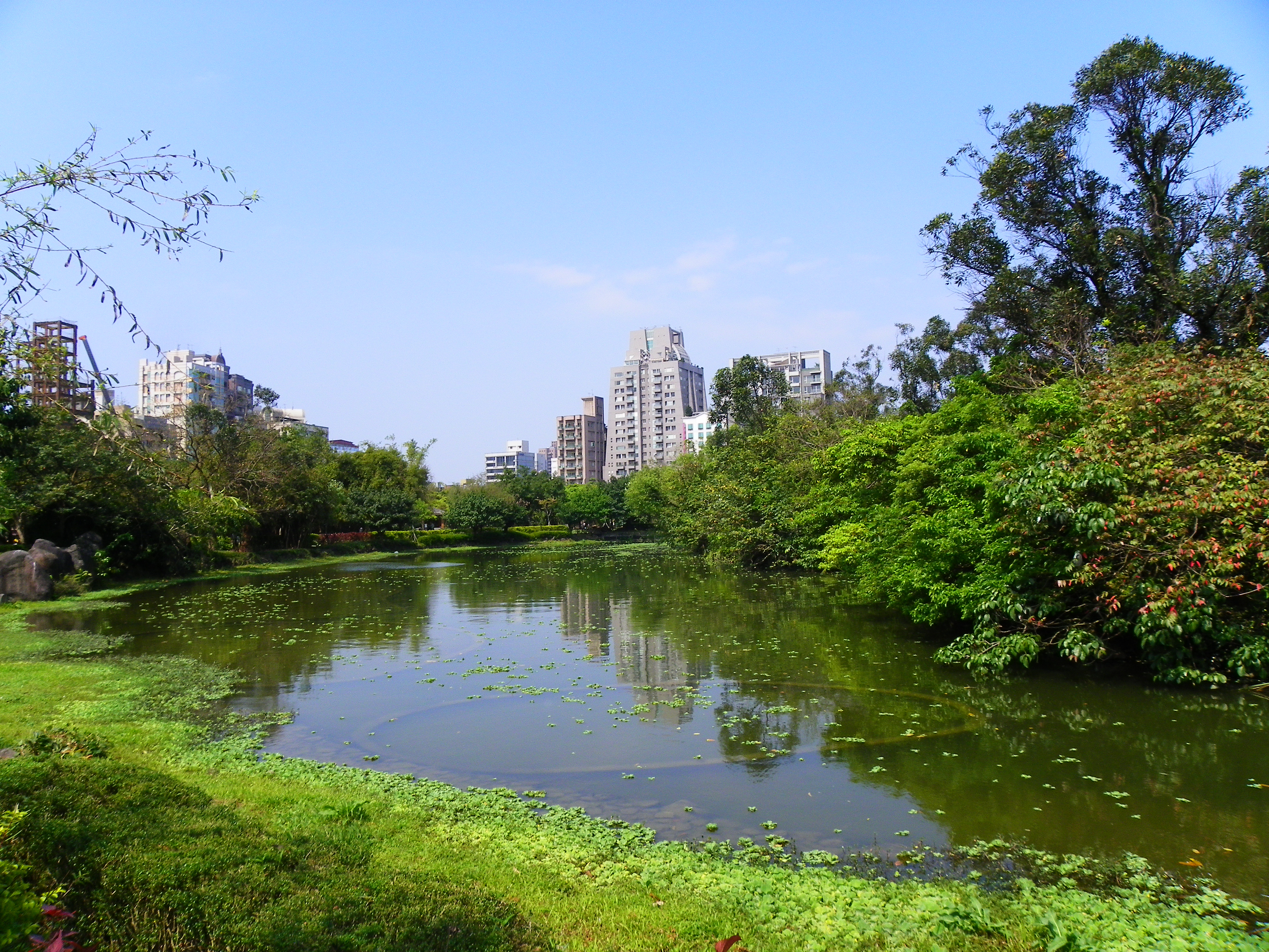 臺北市大安森林公園生態水池西部。